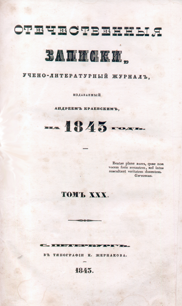 "Отечественные записки", 1843 г.